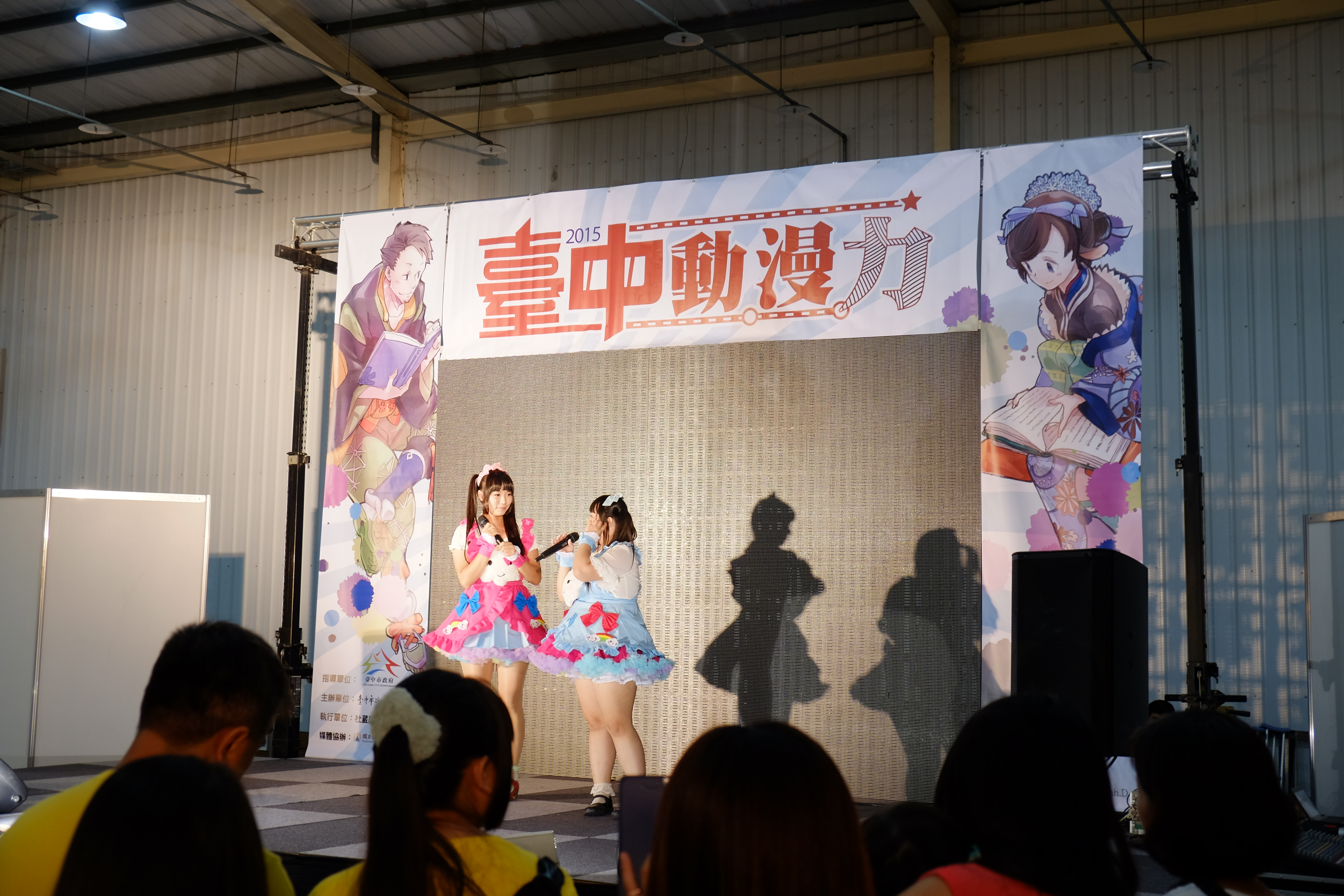 中文（台灣）: 2015臺中動．漫．力第一日上午舞臺區，原宿系舞蹈團體Nyowa Nyowa蛙吉（左）與牛牛（右）開演前問候觀眾。